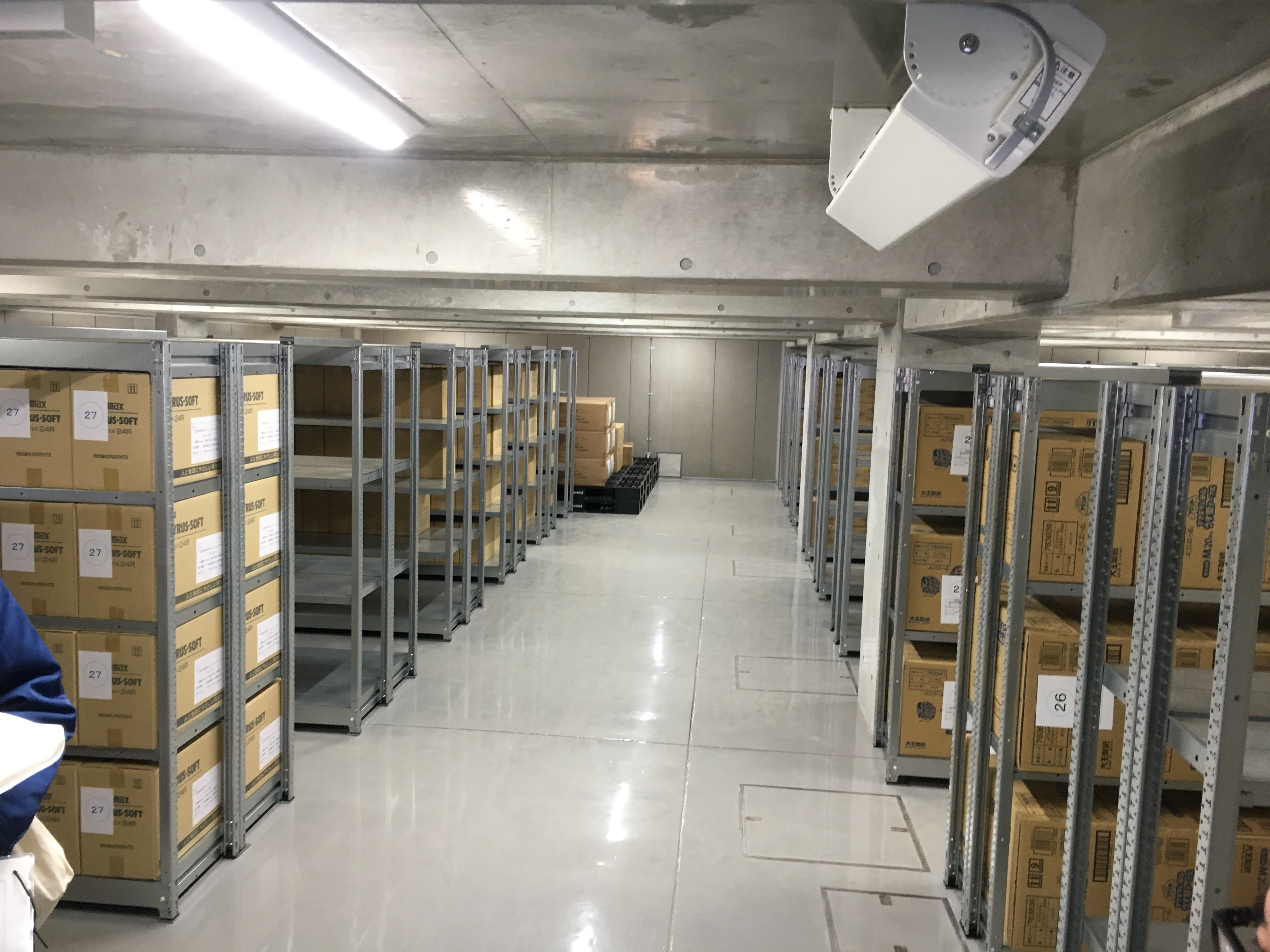 しながわ中央公園拡張部 防災備蓄倉庫